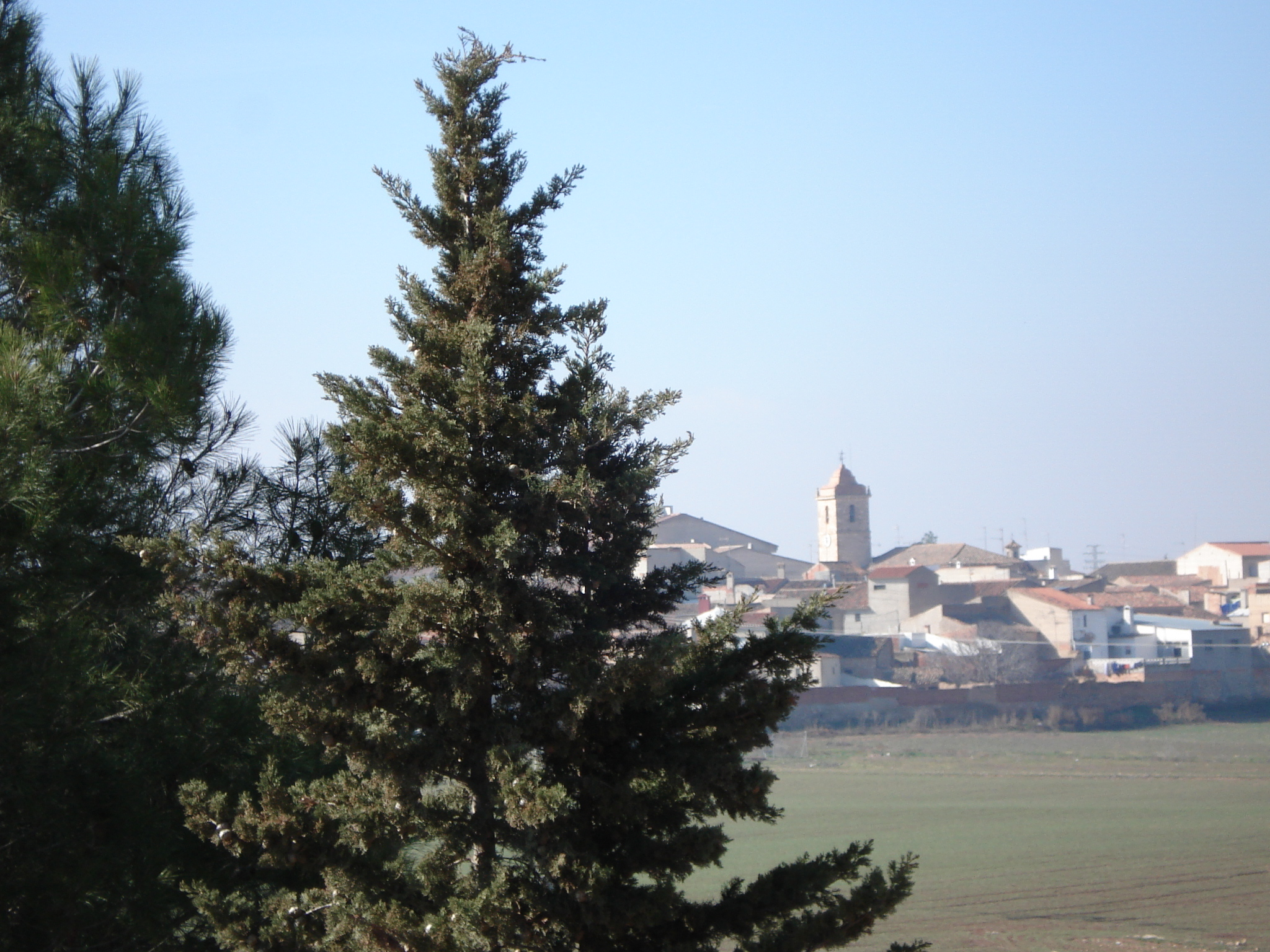 imagen de Casas de Juan Núñez